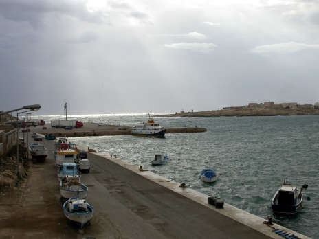 Der Hafen von Lampedusa, Sizilien, Italien